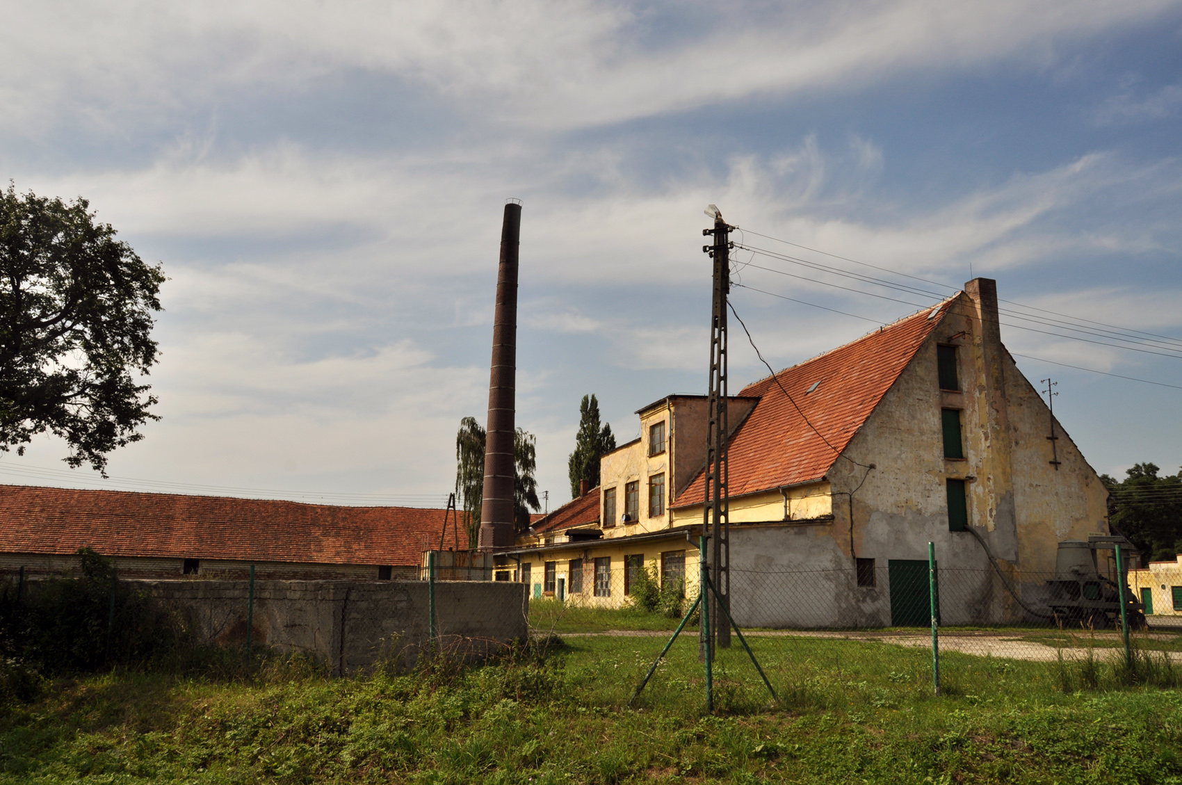 Ogrodnica - zabudowania gospodarskie